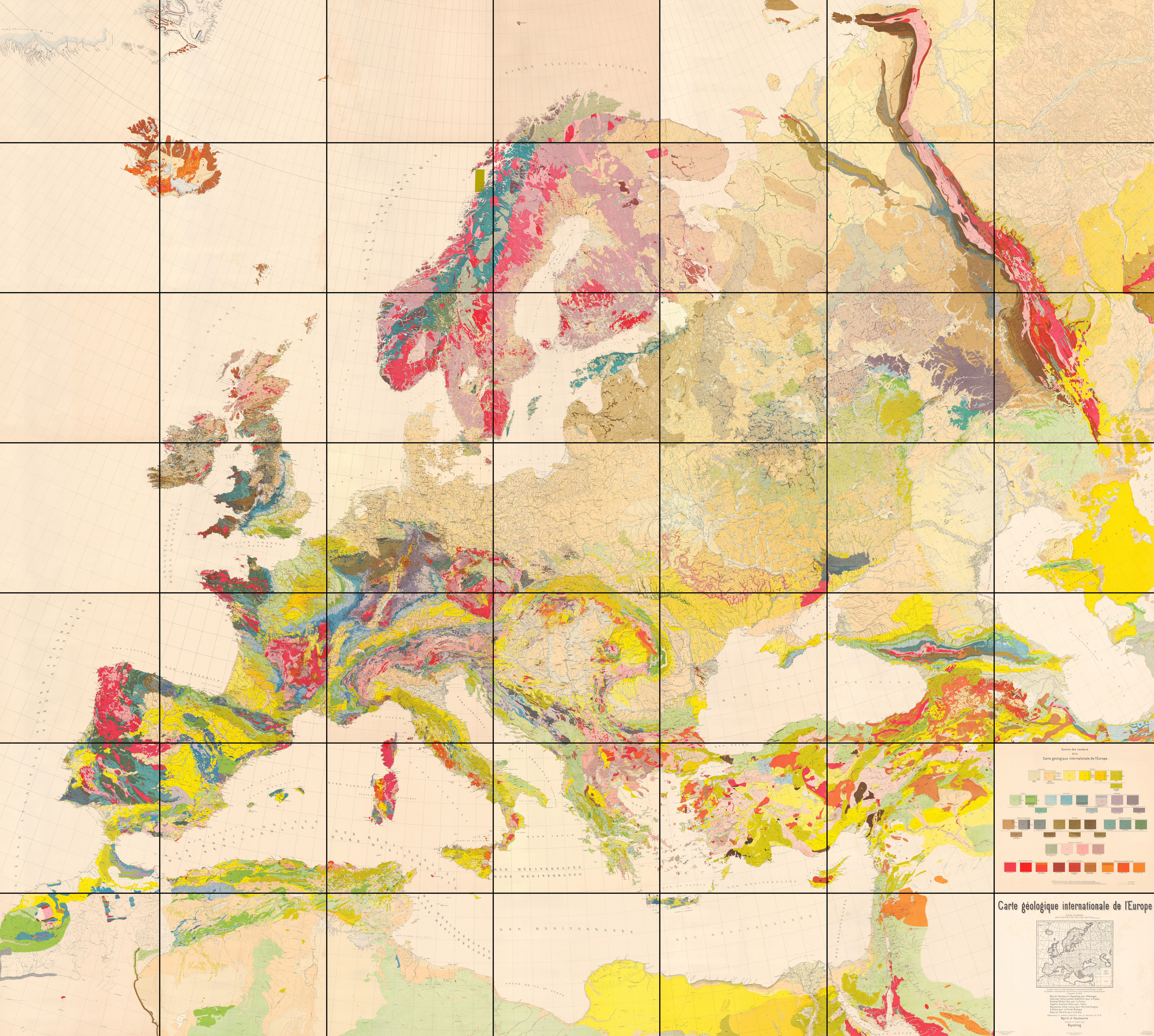 Carte géologique internationale de l'Europe